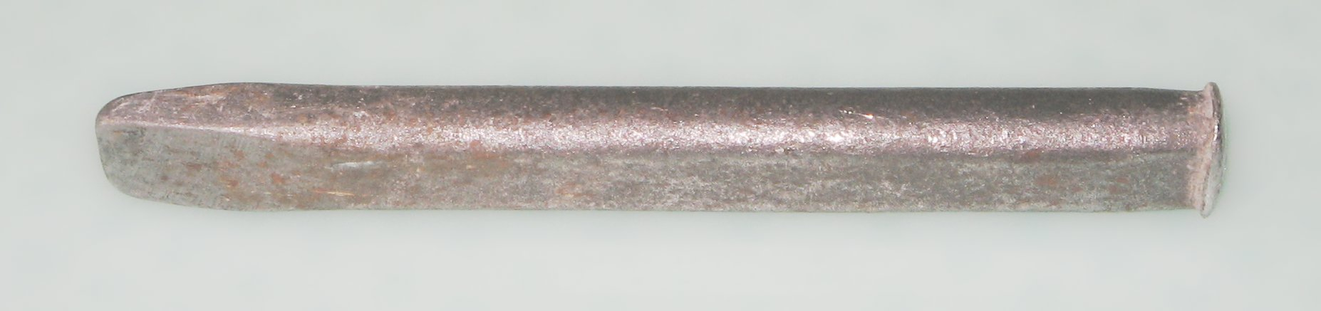 Cxizilo